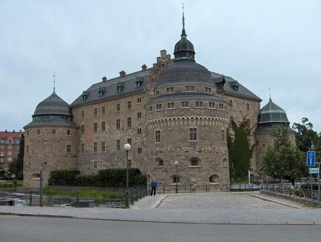 Franklin van Velthuizen, 2004